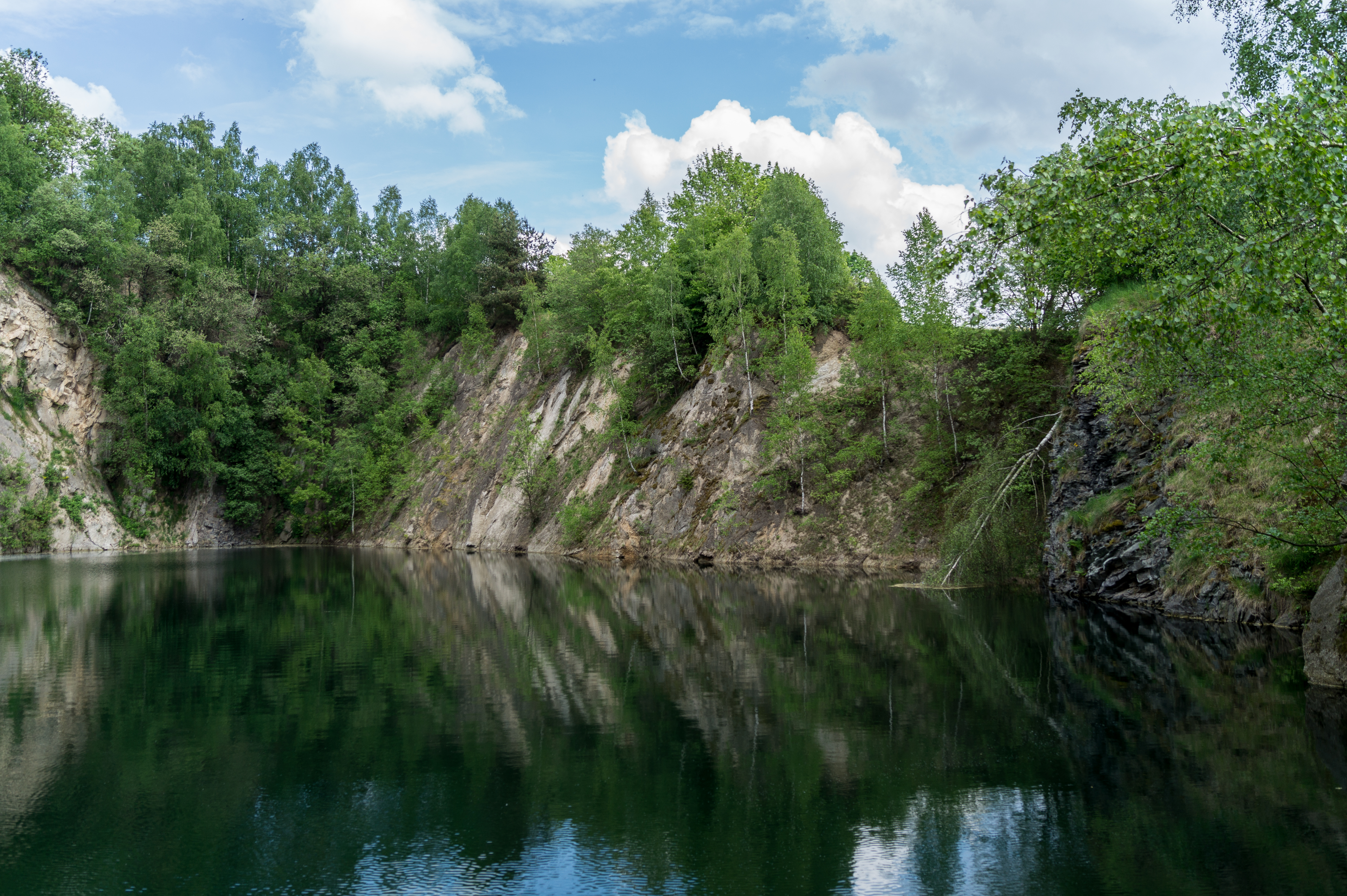 An der östlichen und südlichen Bruchwand des tiefen, wassergefüllten Steinbruchs im Porphygranit sind durchgeschlagene Basaltgänge mit Säuerliger Absonderung zu finden.